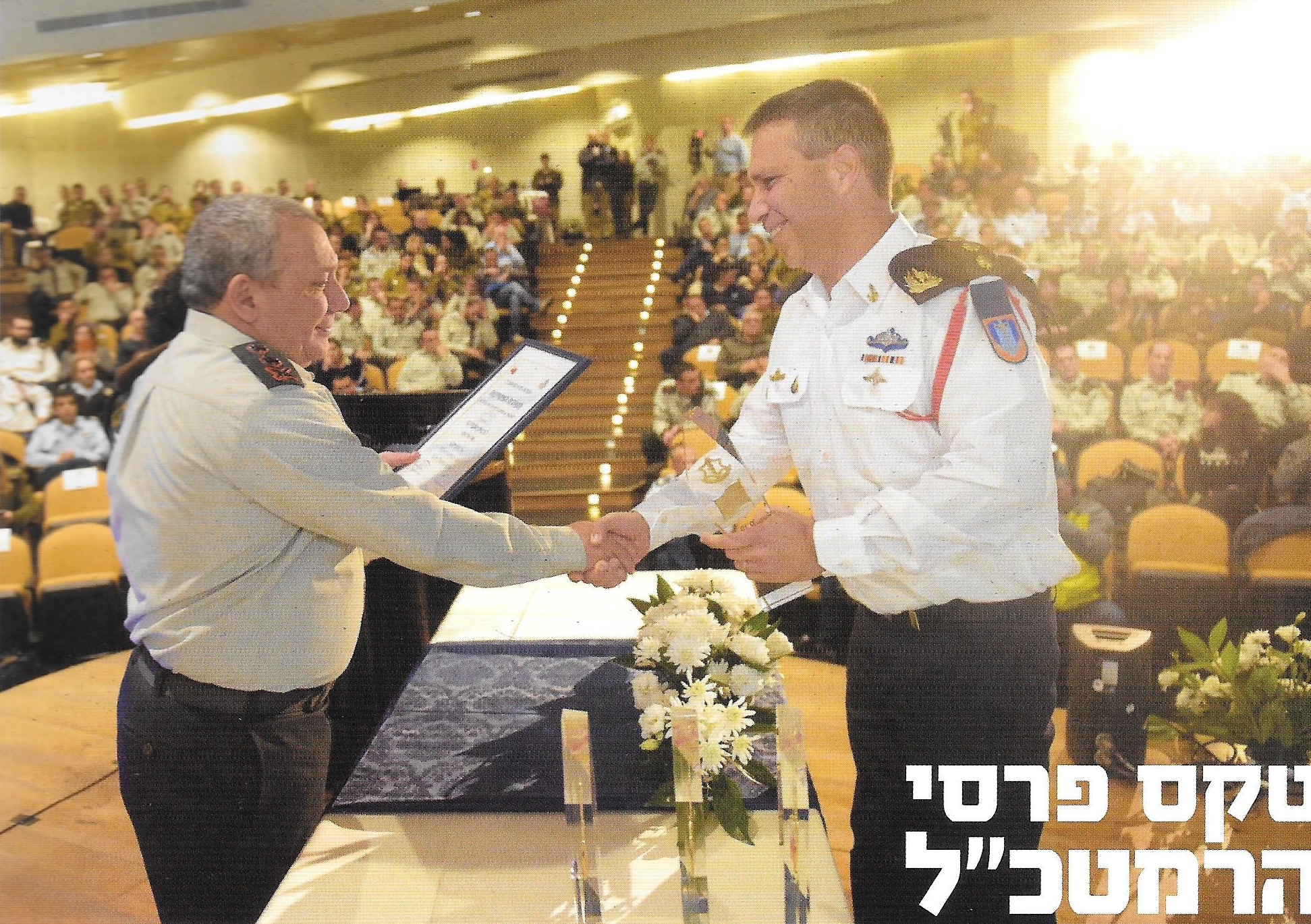 מפקד בה"ד חיל הים אל"מ יובל אילון מקבל פרס הרמטכ"ל מרב אלוף גדי אייזנקוט דצמבר 2016